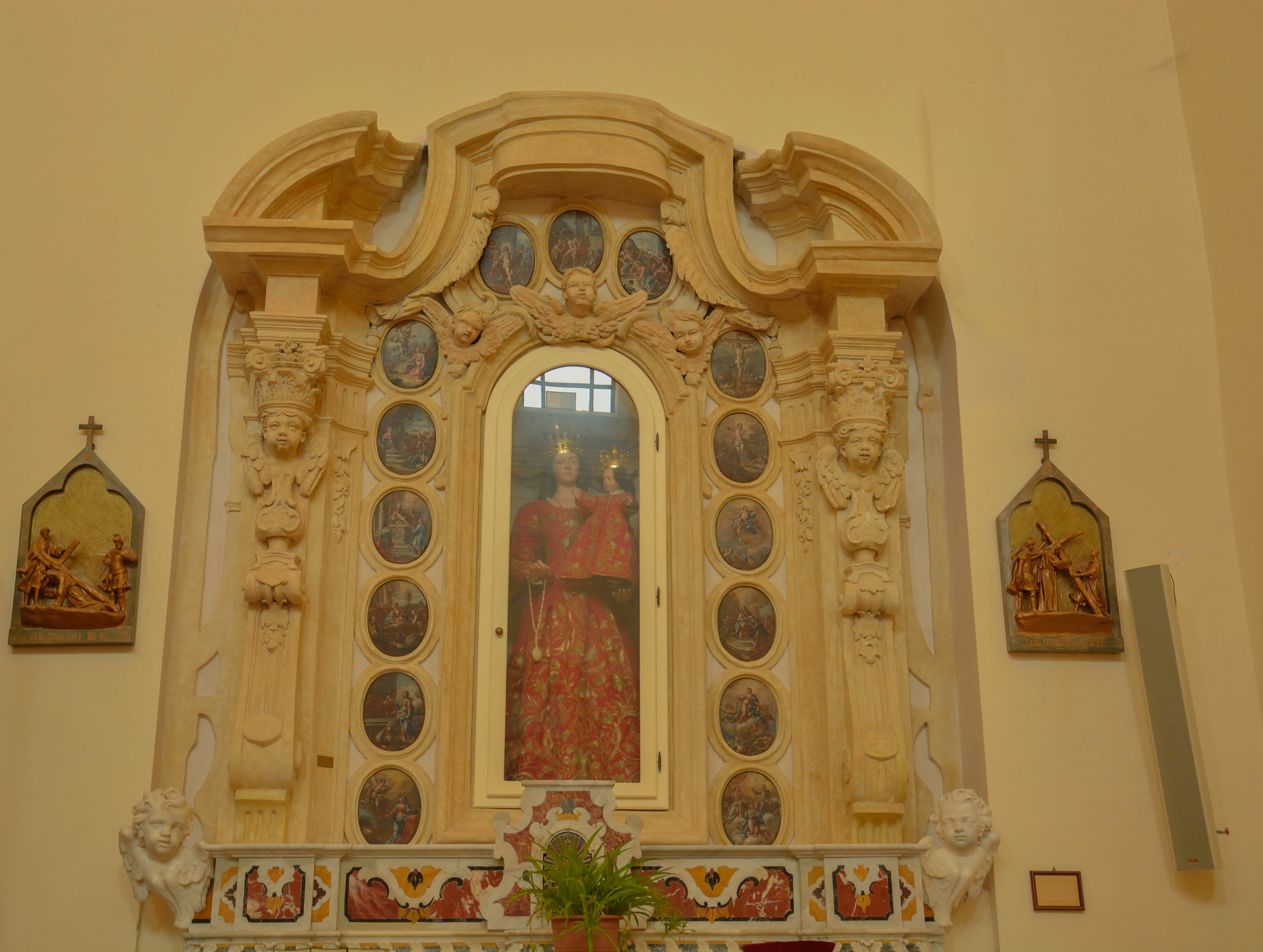 Rappresentazione delle stazioni della Via Crucis nella chiesa di San Bartolomeo di Cassano Irpino